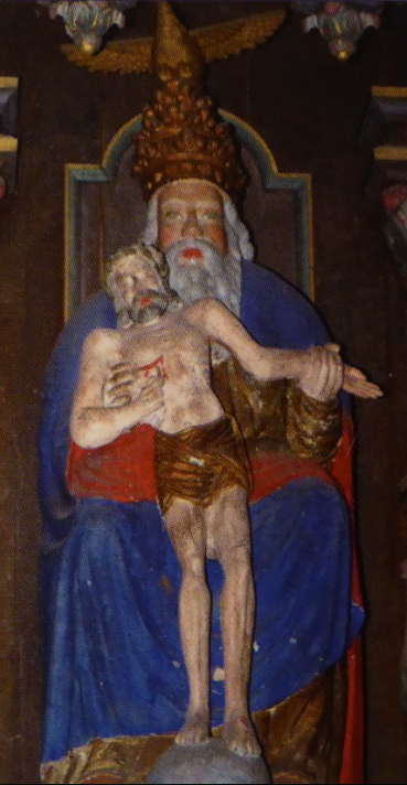 Eglise de Rumengol Statue de la Trinité à droite du choeur